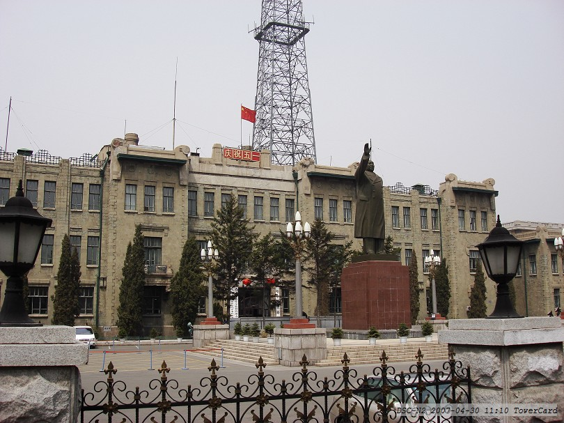 哈铁路局